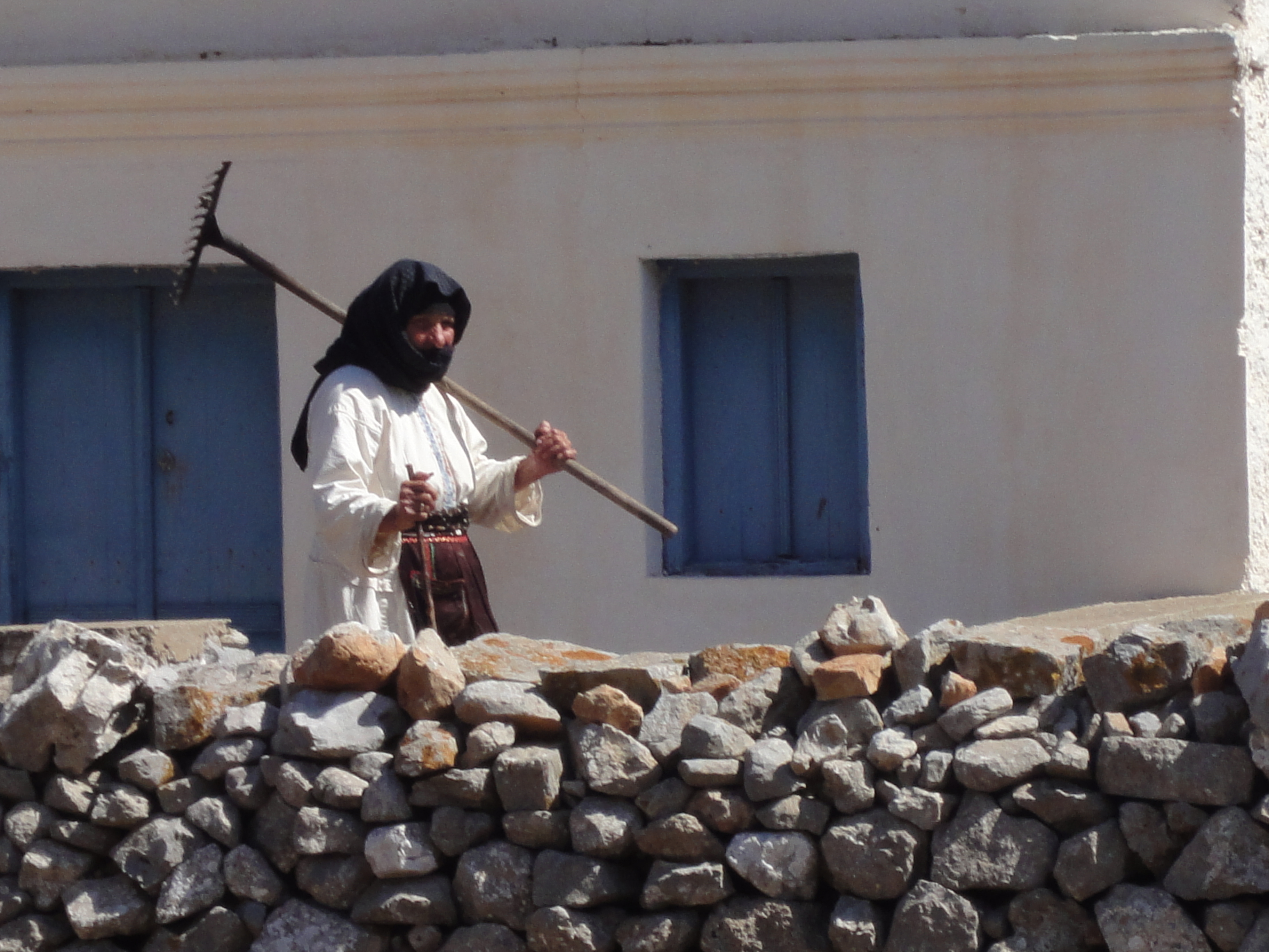 Dorfbewohnerin auf Karpathos, Griechenland